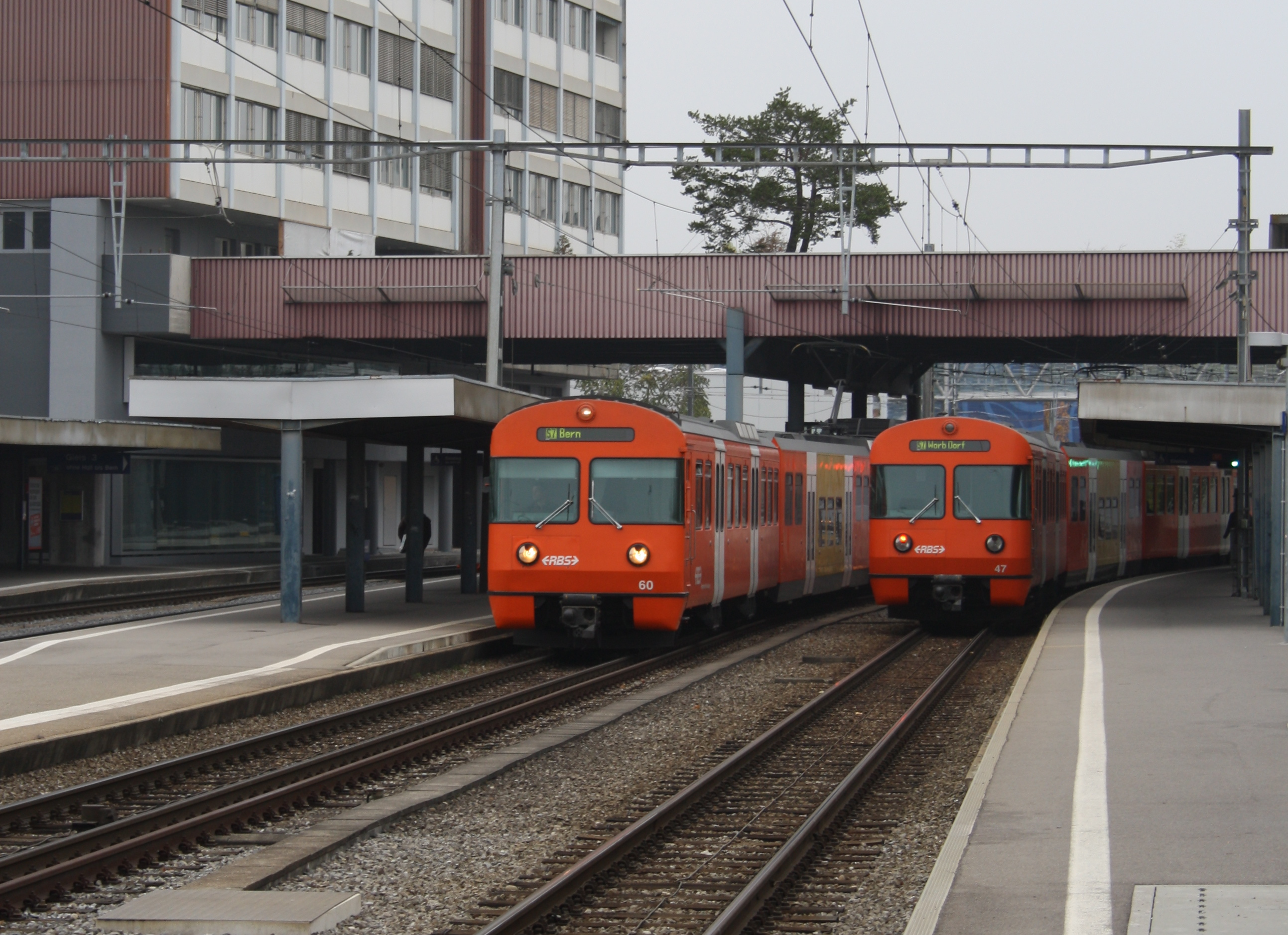 Bahnhof Worblaufen